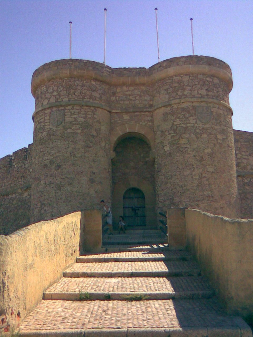 Castillo de Chinchilla de Monte-Aragón, en la provincia de Albacete (España)